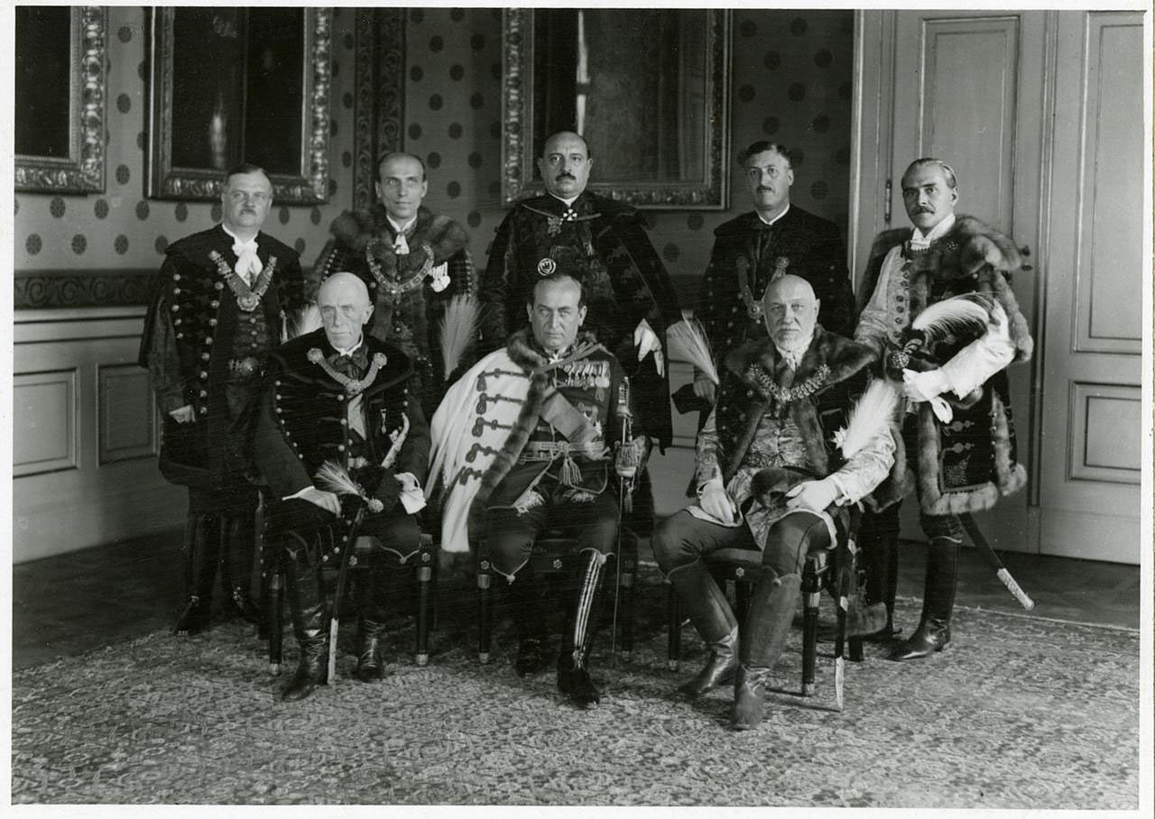 A képen balról jobbra, ülnek: Keresztes-Fischer Ferenc, Gömbös Gyula, Puky Endre; állnak: Fabinyi Tihamér, Imrédy Béla, Hóman Bálint, Lázár Andor, Kállay Miklós